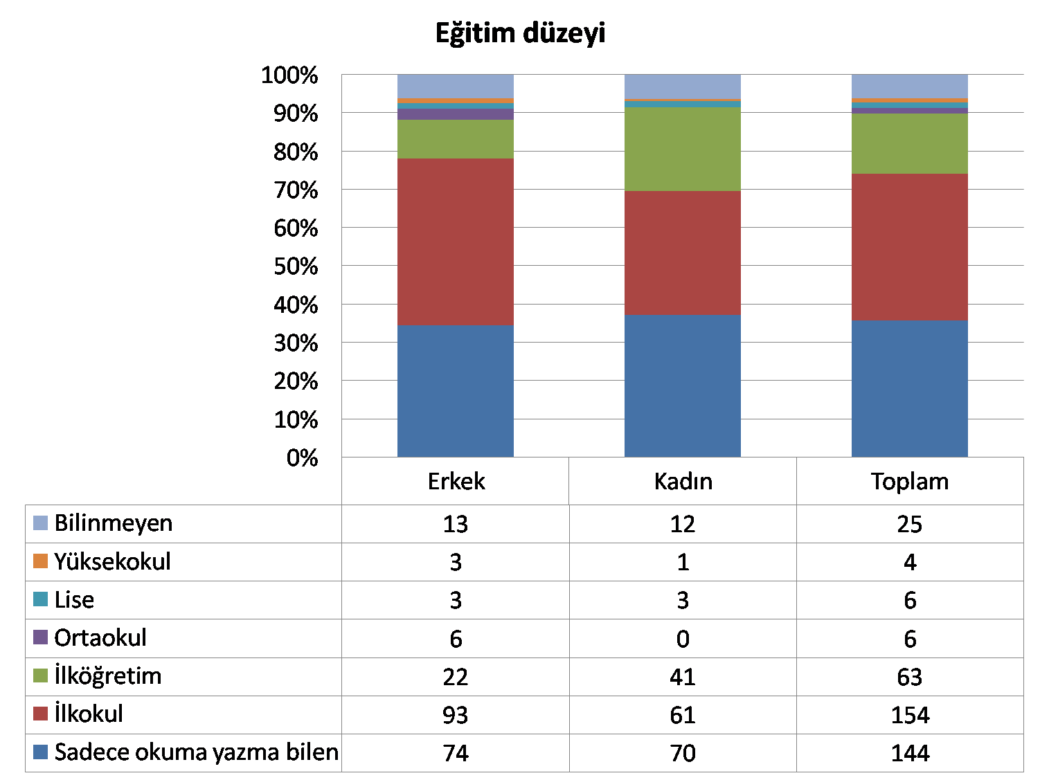 Kahramanmaraş ili Elbistan ilçesi Karamağara köyüne dair istatistik.